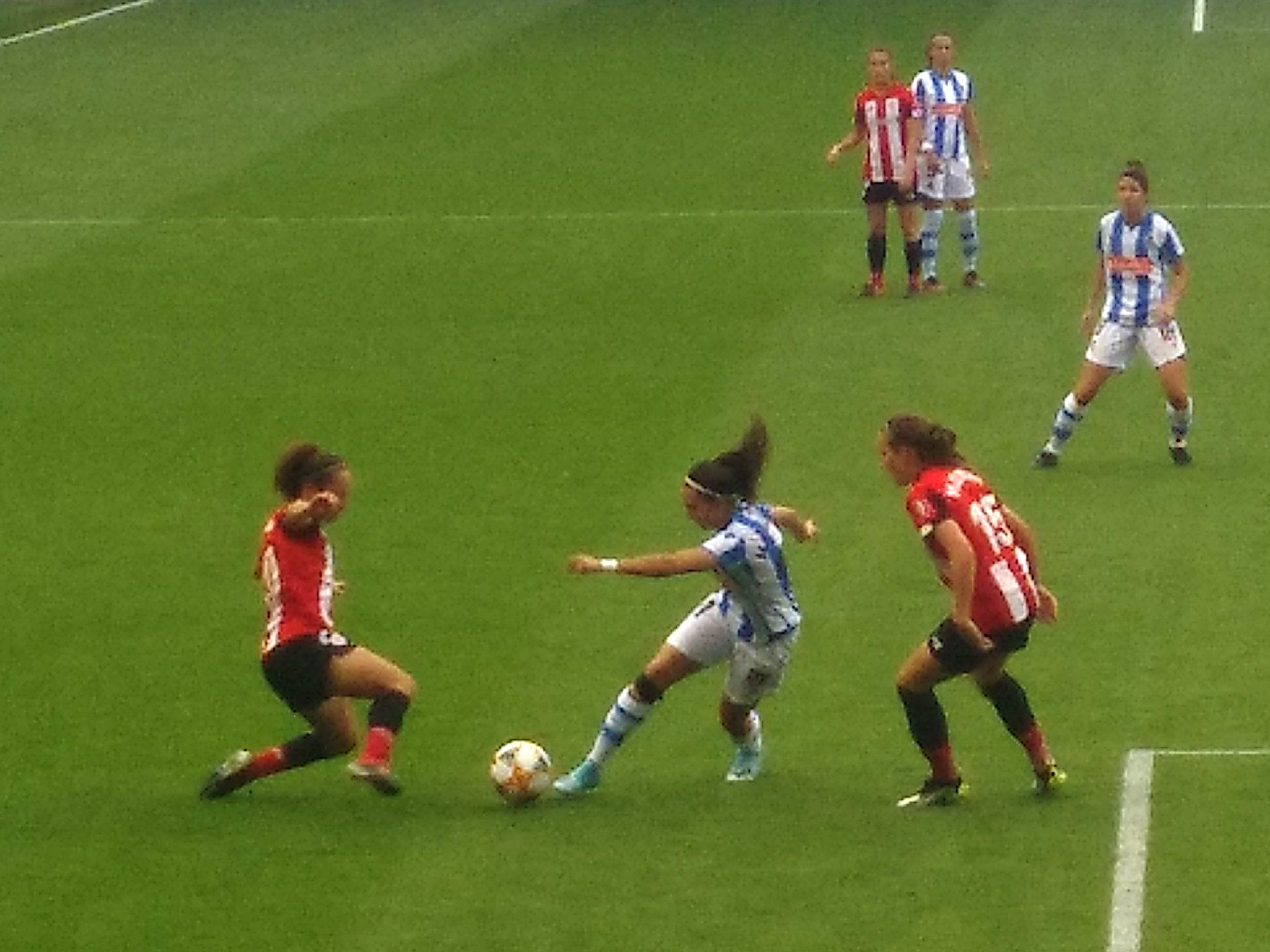 Emakumezkoen euskal derbia 2019-X-13. Asistentzia errekorra Anoetan 28.367. Erreala 0-2 Athletic